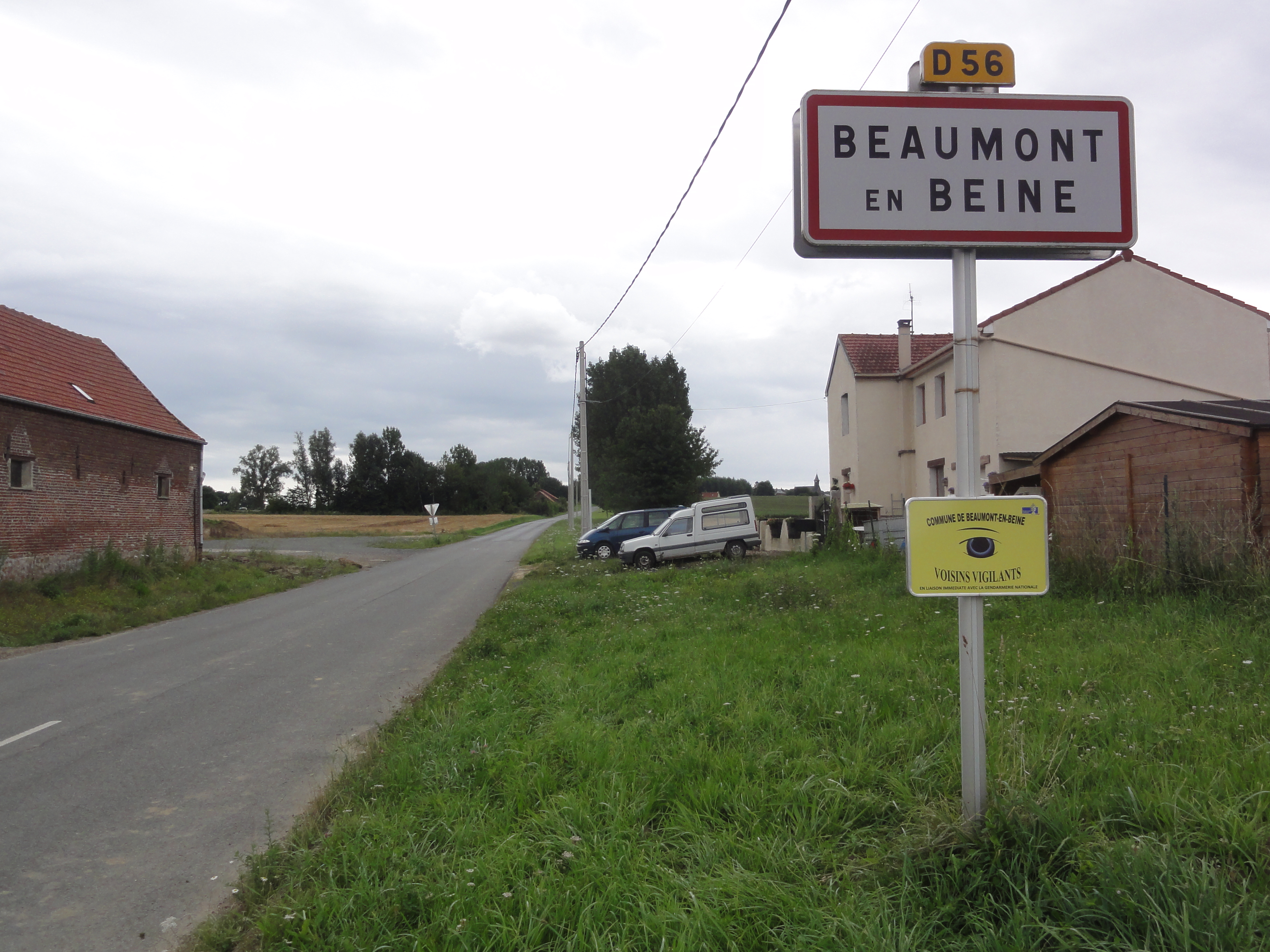 Beaumont-en-Beine (Aisne) city limit sign